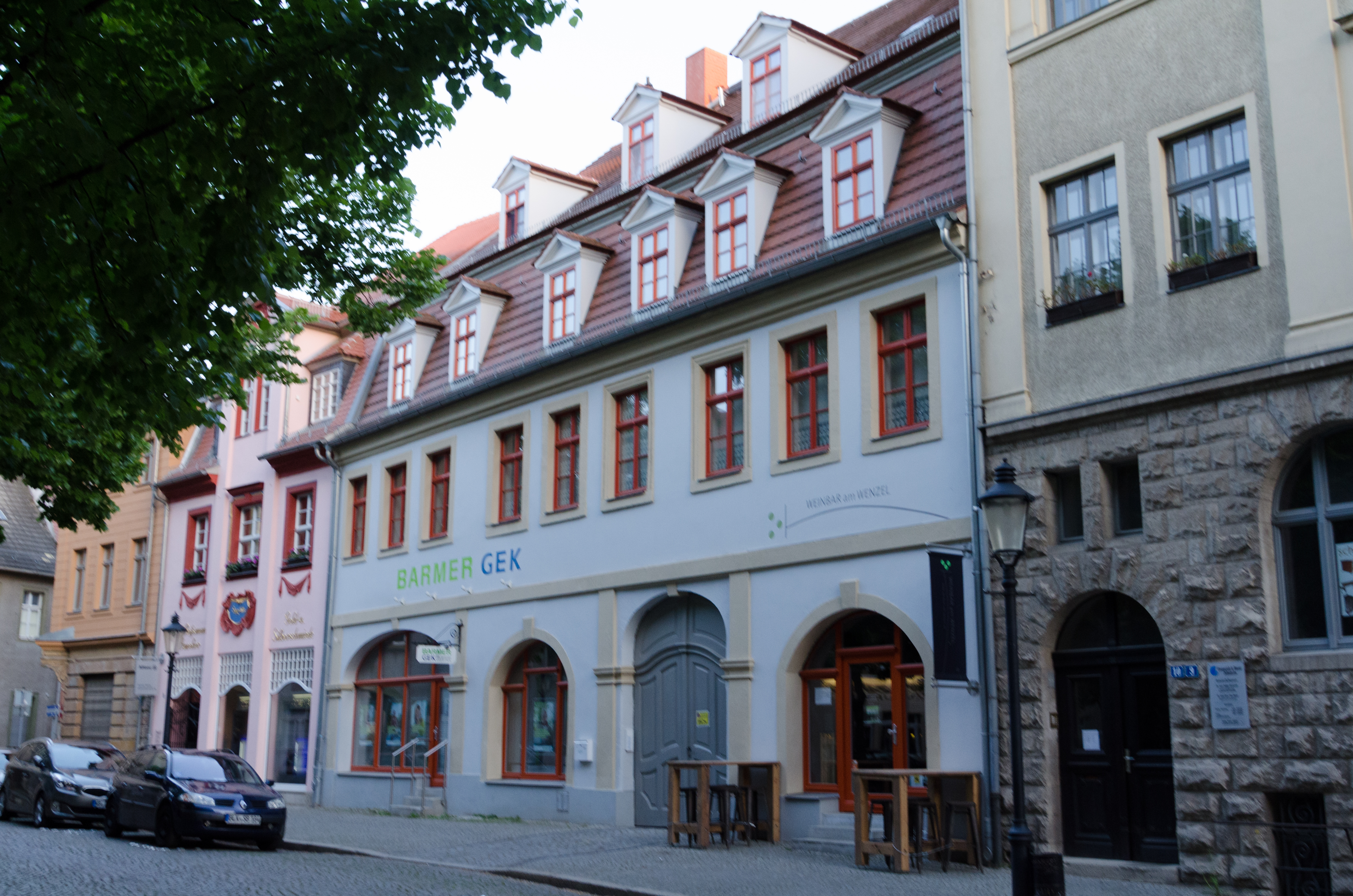 Naumburg, Topfmarkt 11